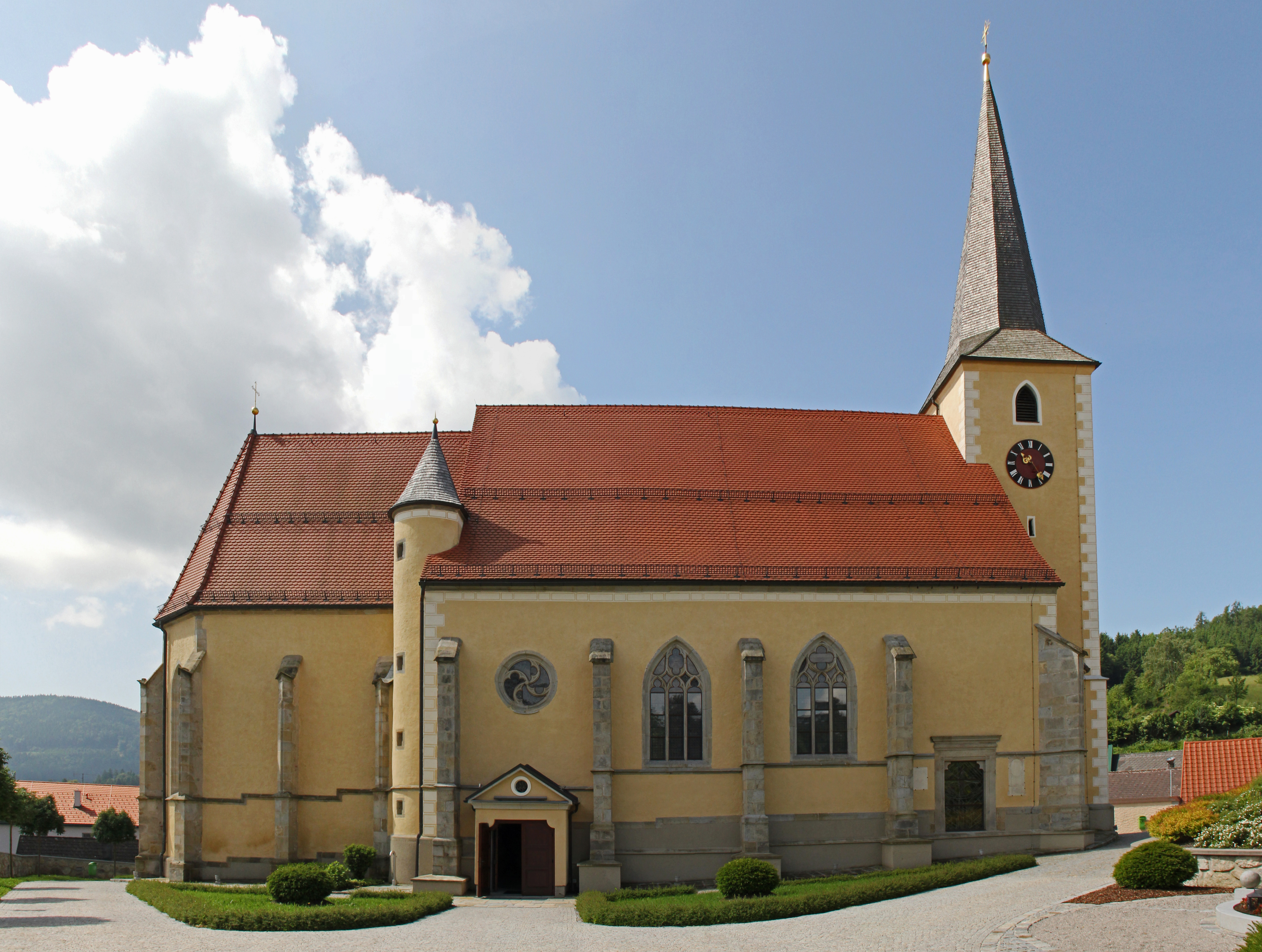 Die Pfarrkirche von Waldhausen ist das bedeutendste nachgotische Bauwerk in Österreich.